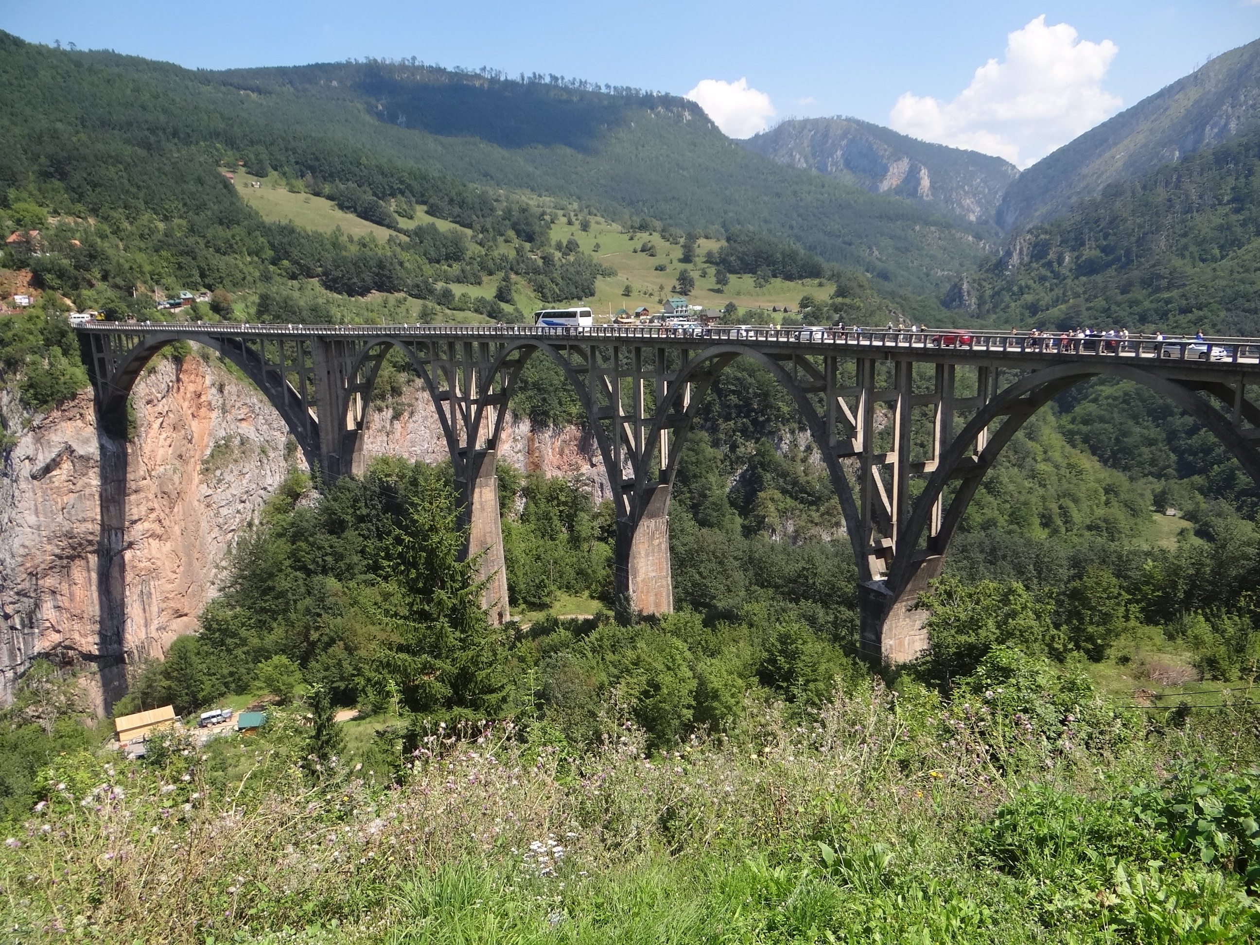 Wiadukt na rzece Tara